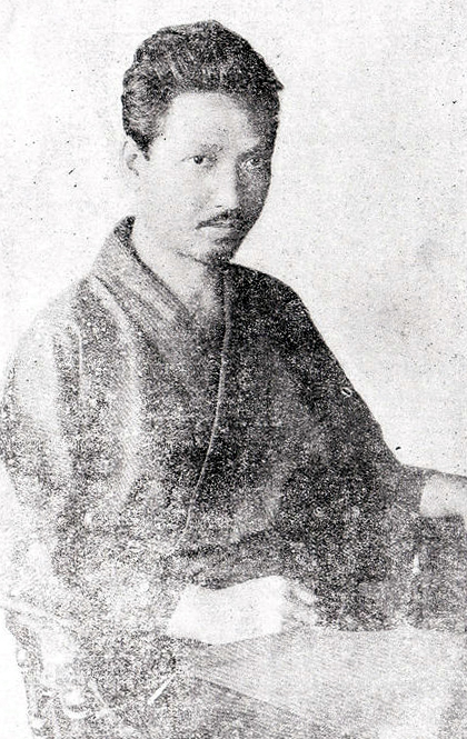 1921年頃、雑誌『改造』（1955年廃刊）に掲載された大杉栄のポートレイト。